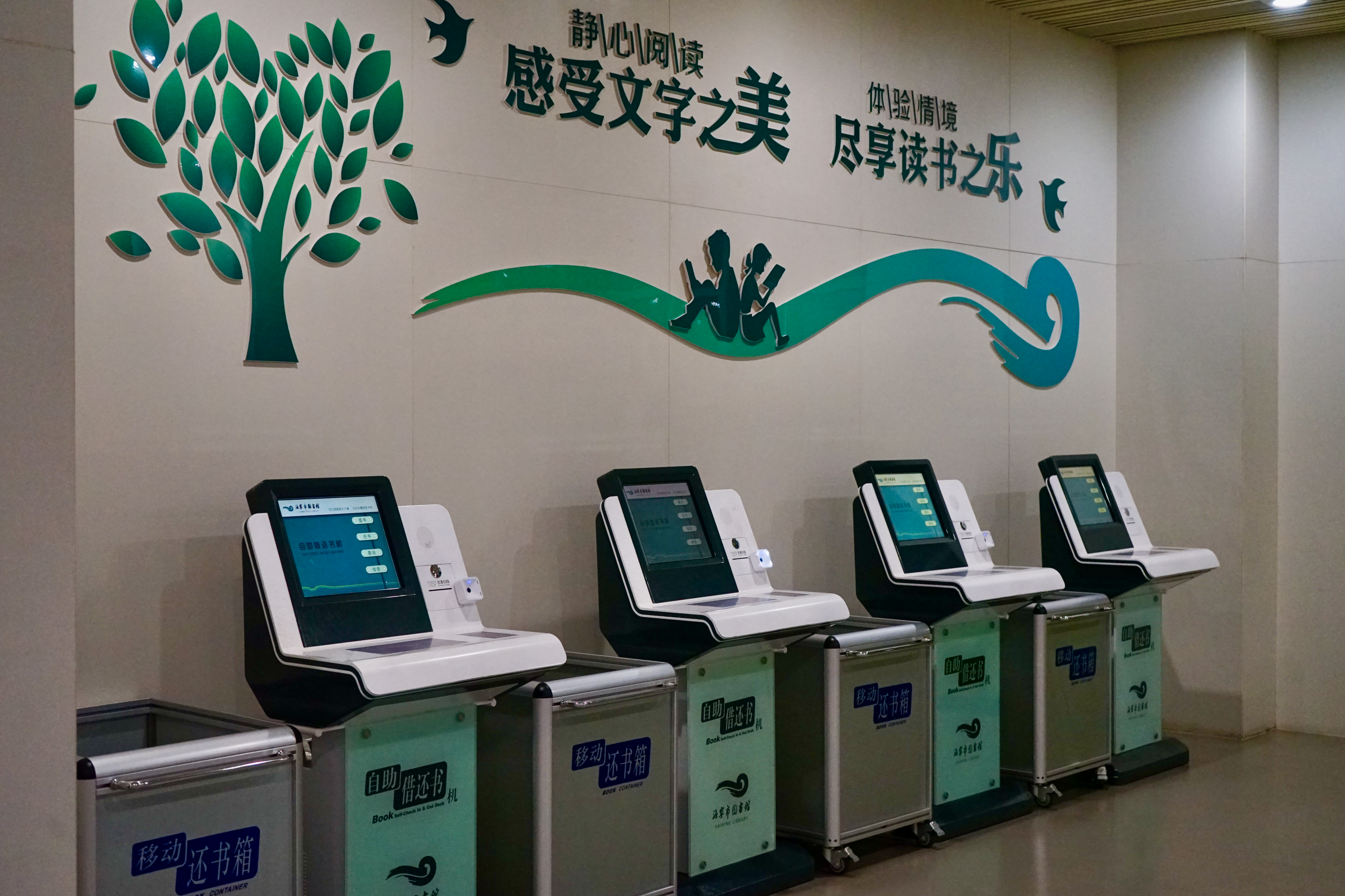 中文（中国大陆）: 海宁图书馆